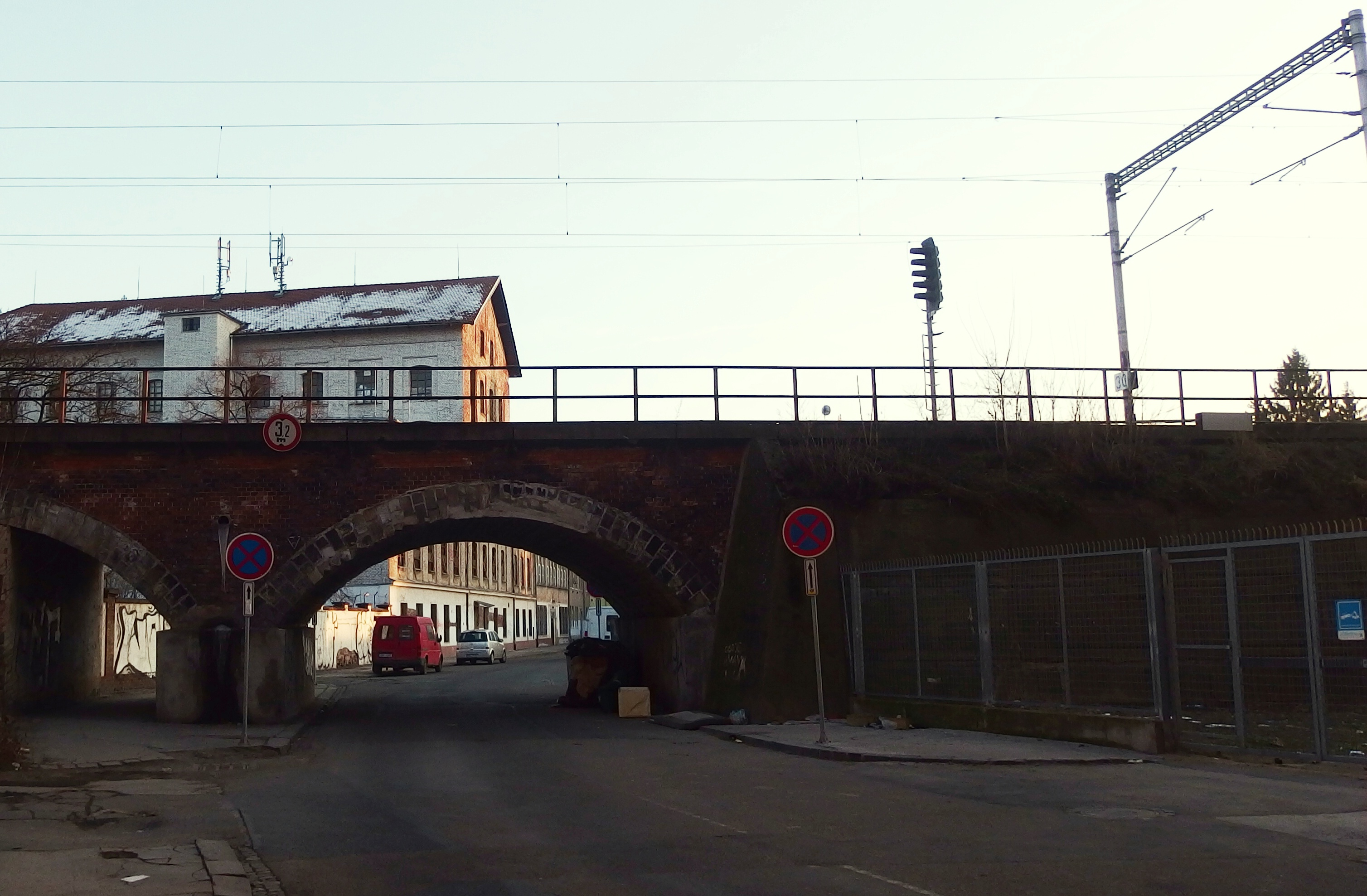 Brno, Vlhká ulice.